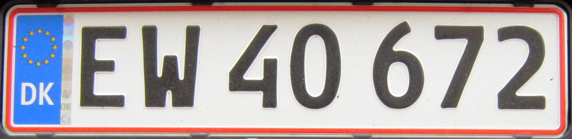 Denemarken kenteken wit nieuw